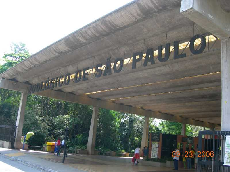 Entrada do Zoológico de SP